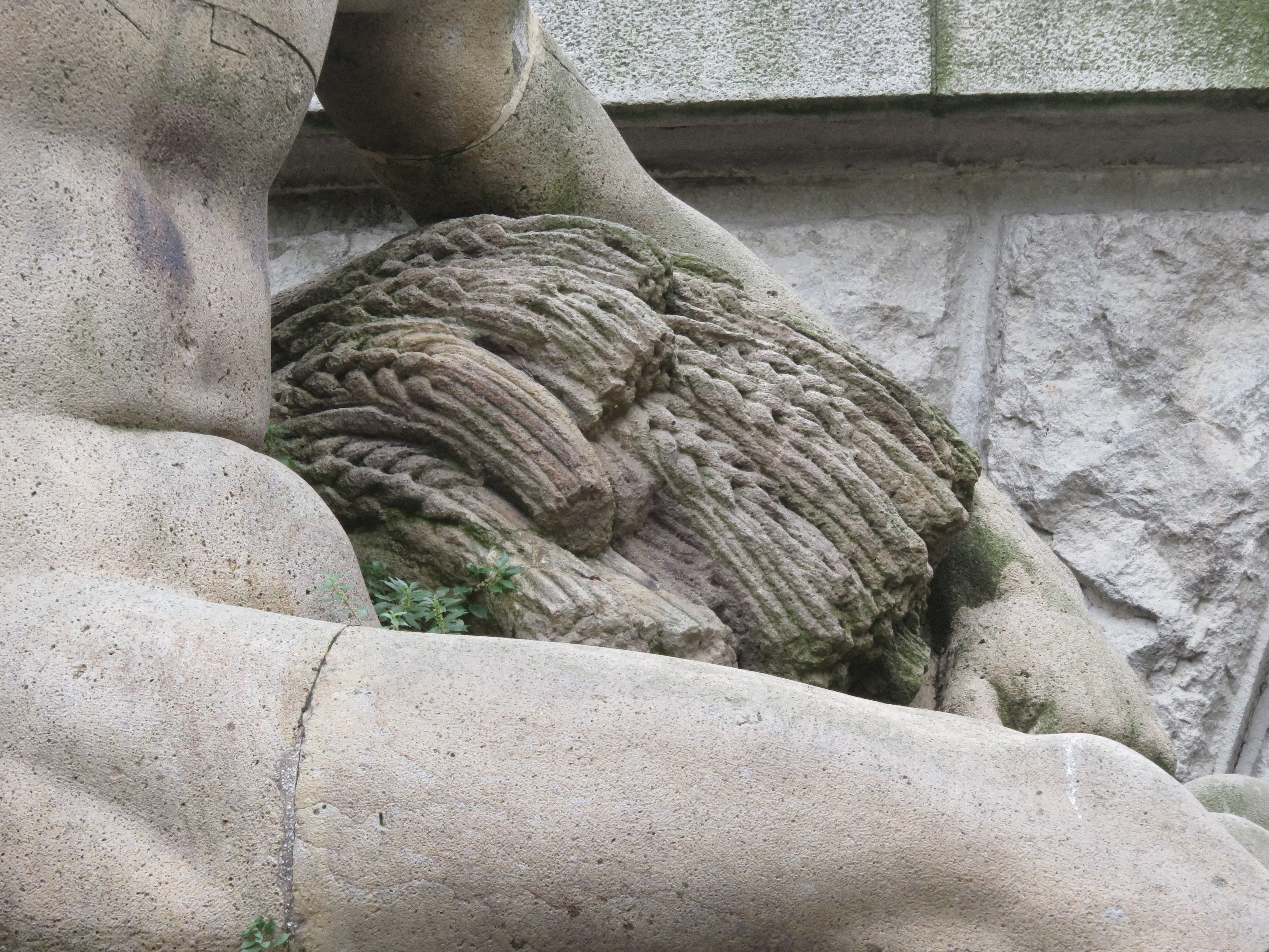 Il Po e i suoi affluenti. Fontana realizzata in cemento armato da Arrigo Minerbi per l'acquedotto monumentale di Ferrara in piazza XXIV Maggio. Particolare.